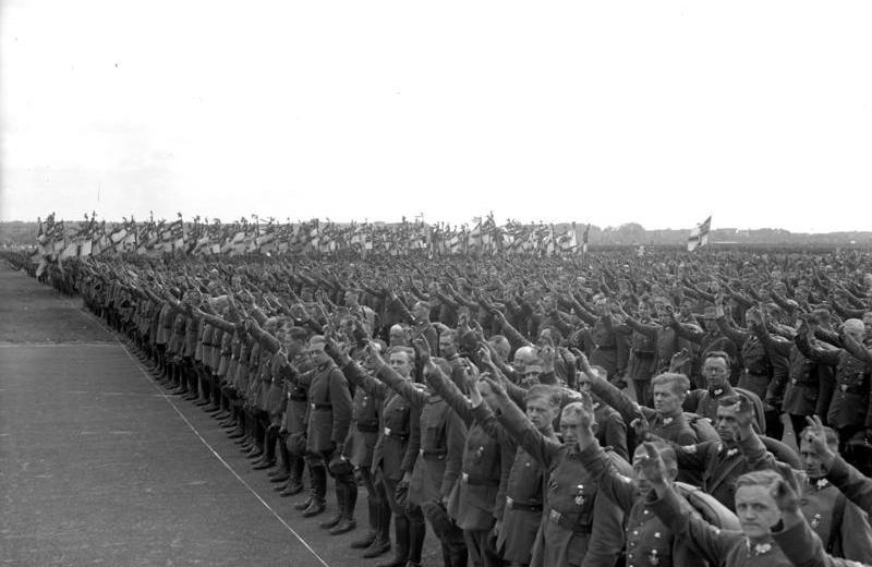 Der grosse 13. Frontsoldatentag des Stahlhelms im Zentralflughafen in Berlin, an über 150 000 Stahlhelmer nahmen an dem Aufmarsch teil ! 150 000 Stahlhelmer auf dem Flughafen in Berlin leisten den Treueschwur.